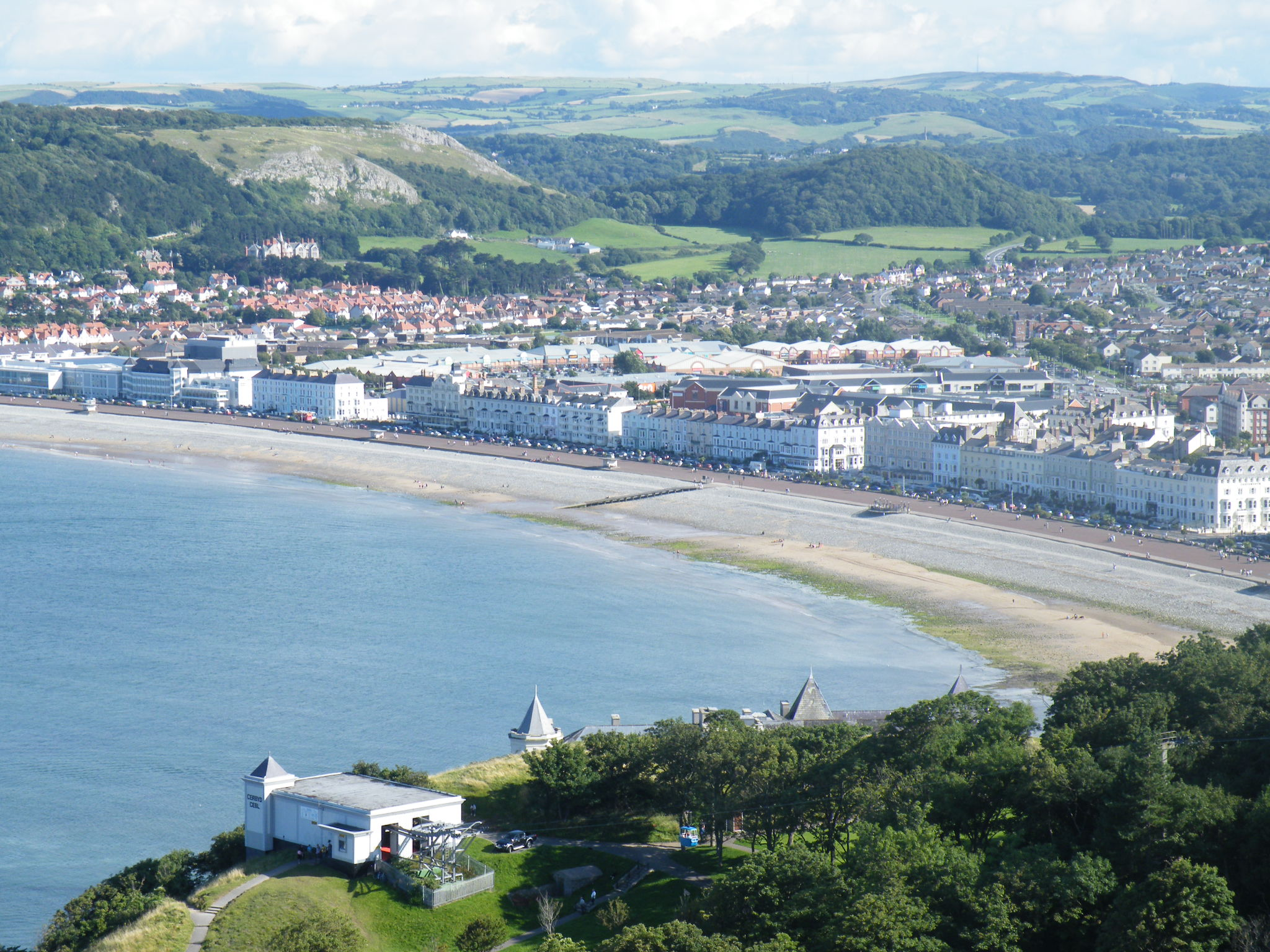 Llandudno o'r Gogarth